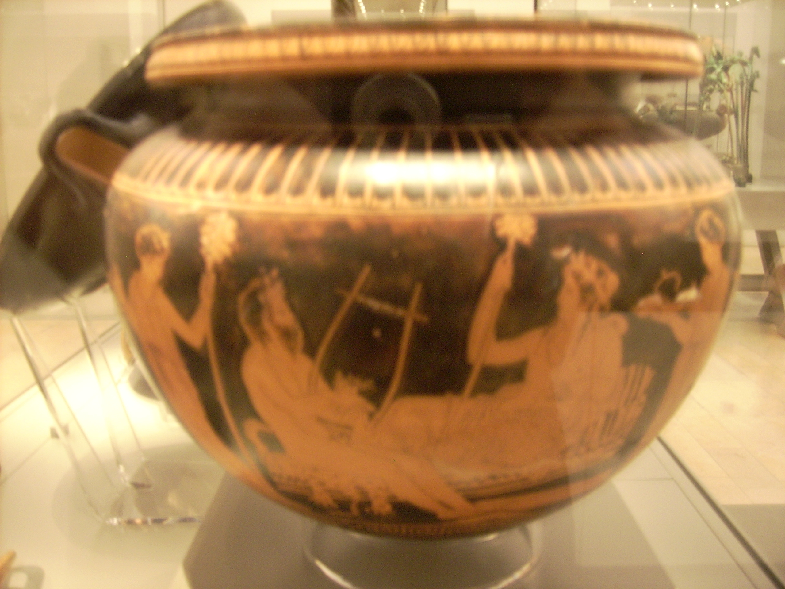 Antikensammlung Berlin/Altes Museum